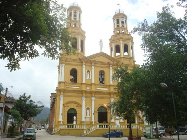 CATEDRAL DE SAN SEBASTIAN DE LA PLATA HUILA COLOMBIA